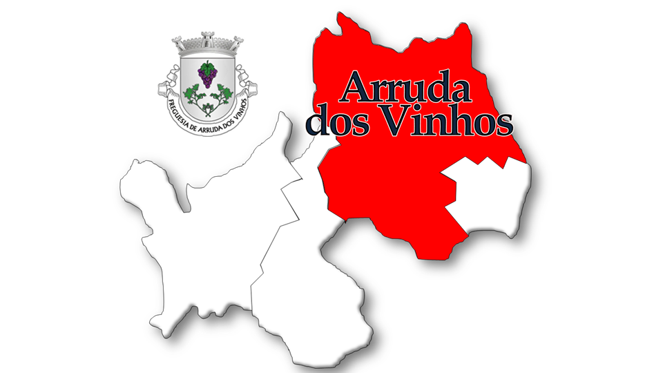 Evolução da População